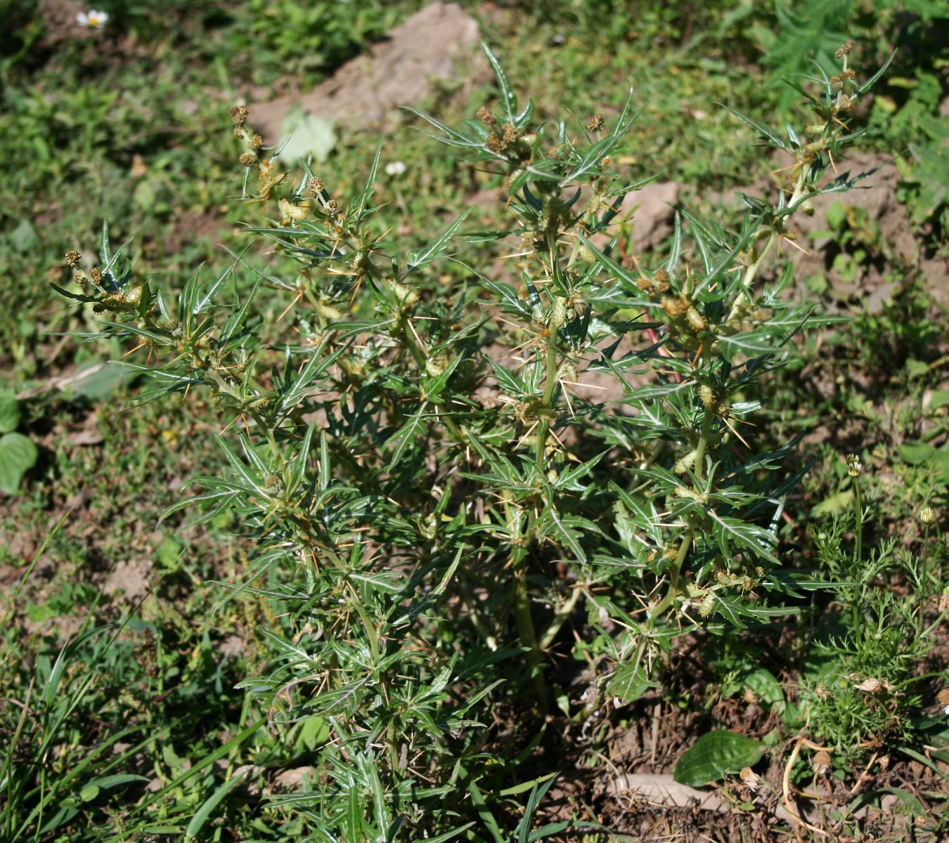 Xanthium spinosum, Korbblütler (Asteraceae) – Georgien/საქართველო: Kleiner Kaukasus, S Patara Mitarbi, ca. 4 km NE Bakuriani/ბაკურიანი, ca. 1310 m s.m.